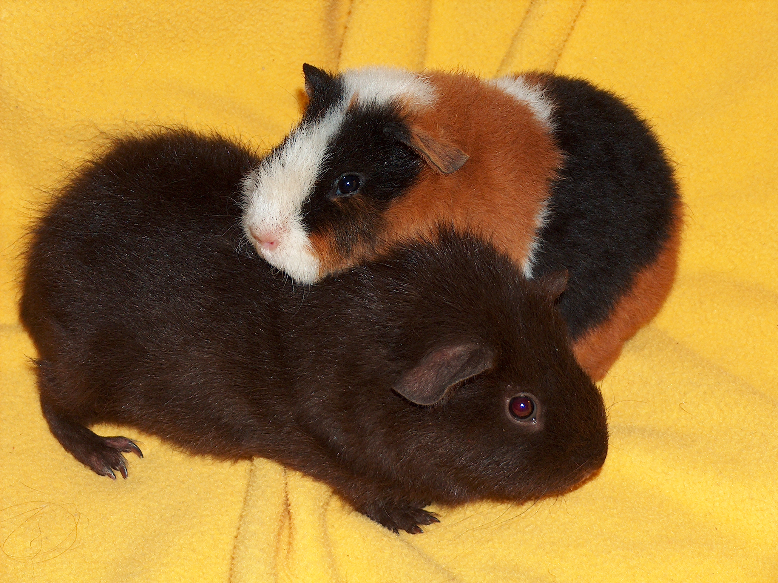 Cavia porcellus